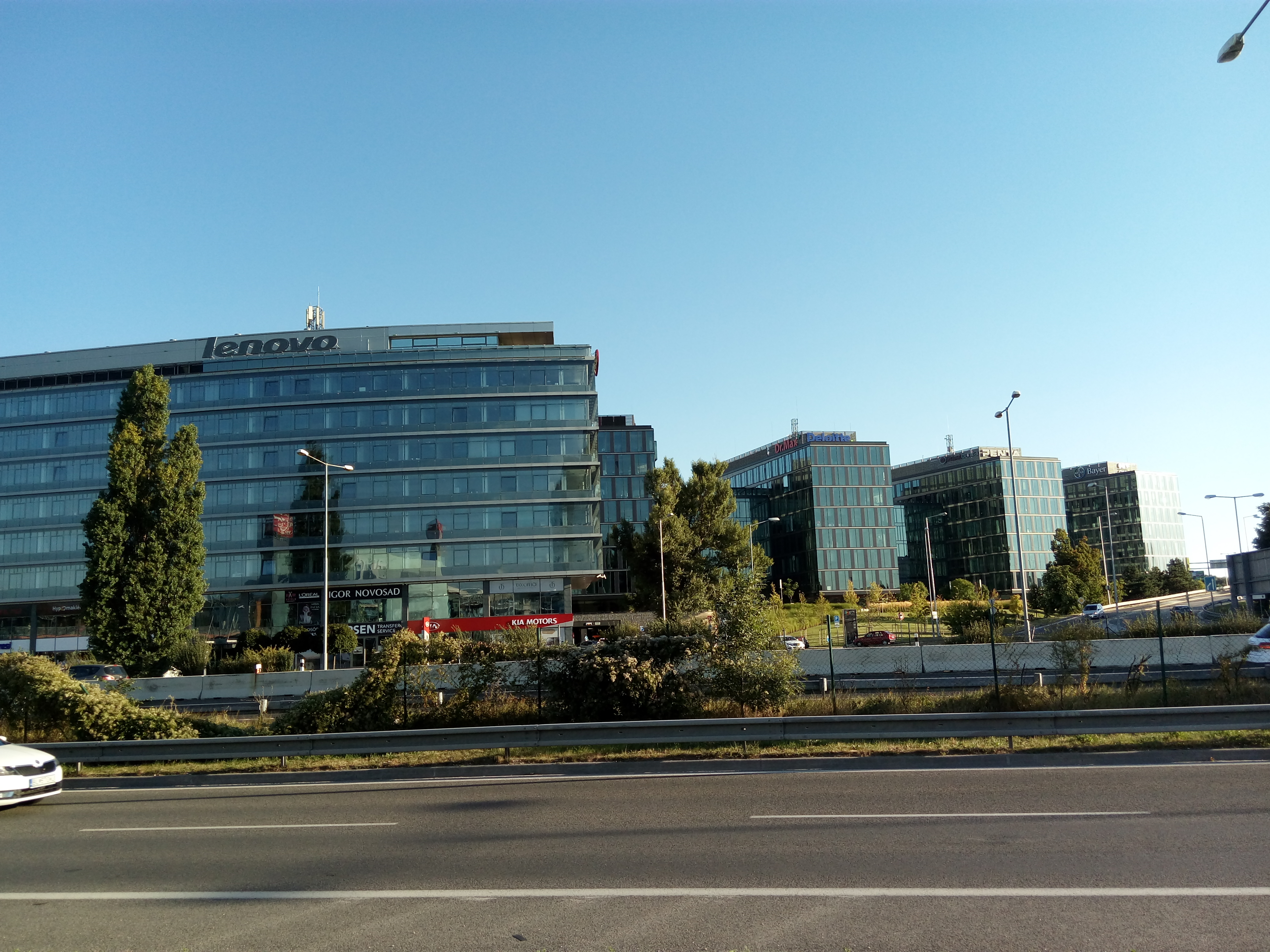 Digital Park, Einsteinova, Petržalka, Bratislava